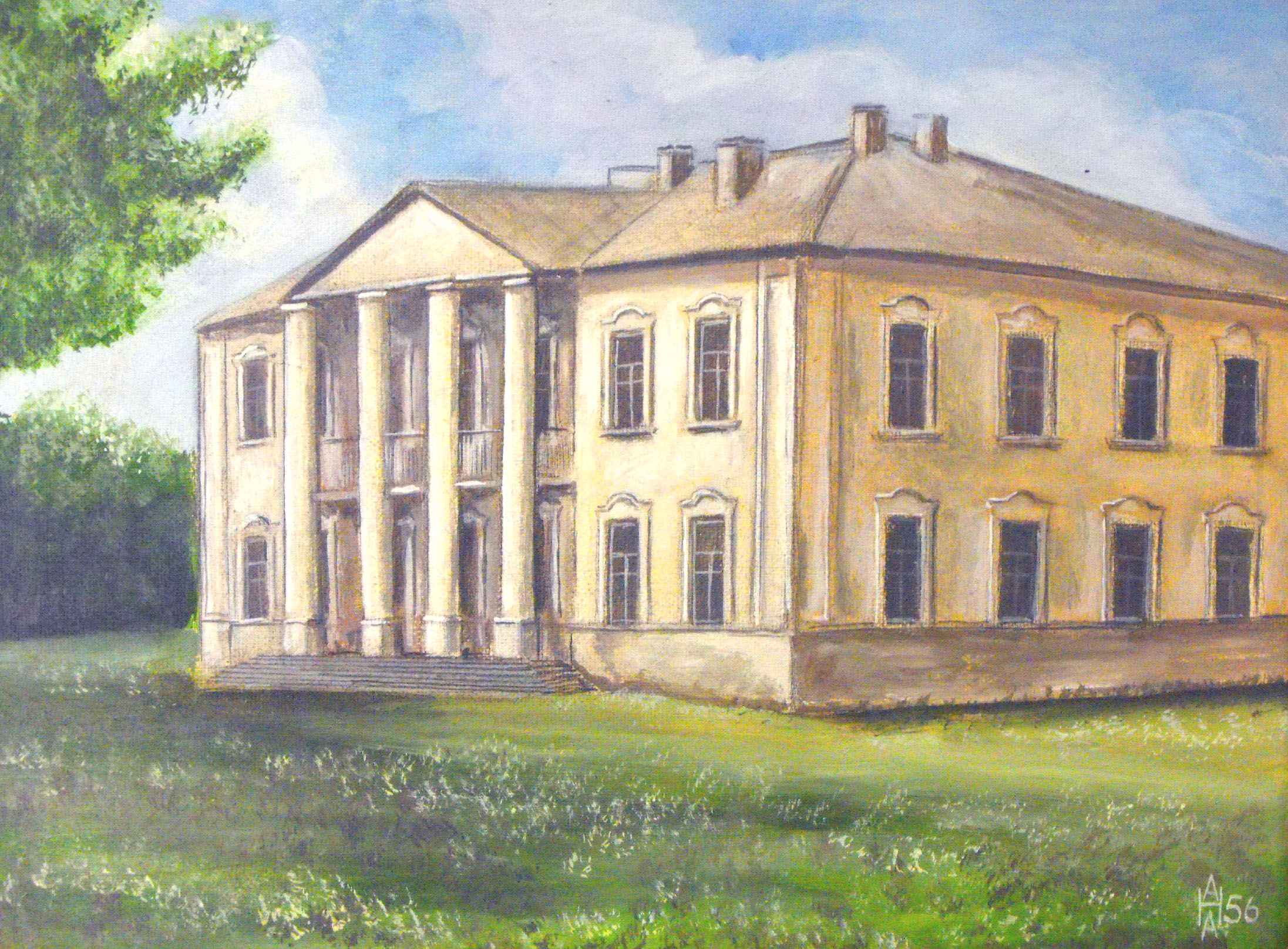 Мир, иешива, 1956 год. Яичная темпера. Художник - Анатолий Наливаев.